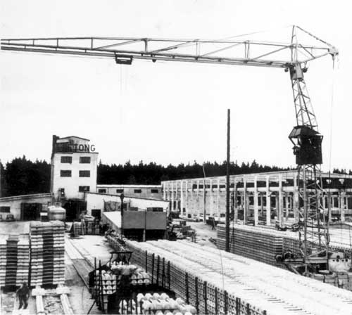 Abetongs fabrik i Vislanda: Sliperhallen till vänster, till höger nya hallen för byggnadsstommar, bilden från början av 1960-talet, mitt i bild syns öppningarna till härdtunnlarna